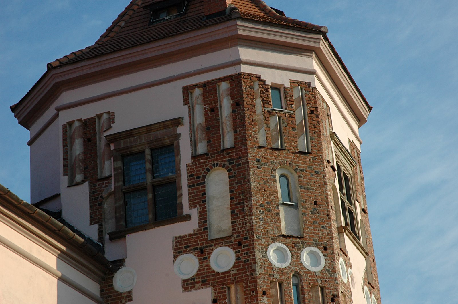 Мирский замок